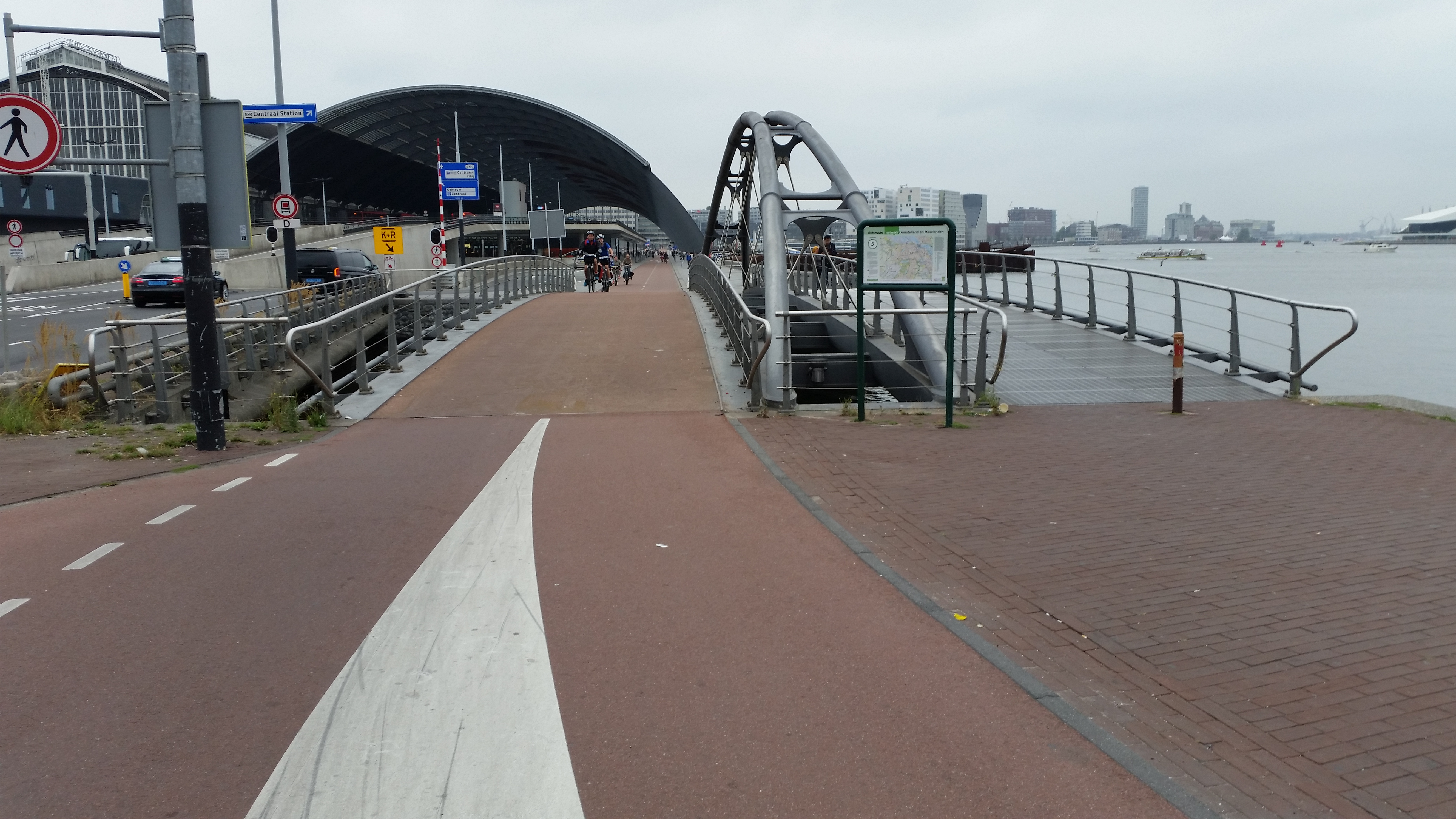 Brug 2274 (in Amsterdam); overzicht, richting westen